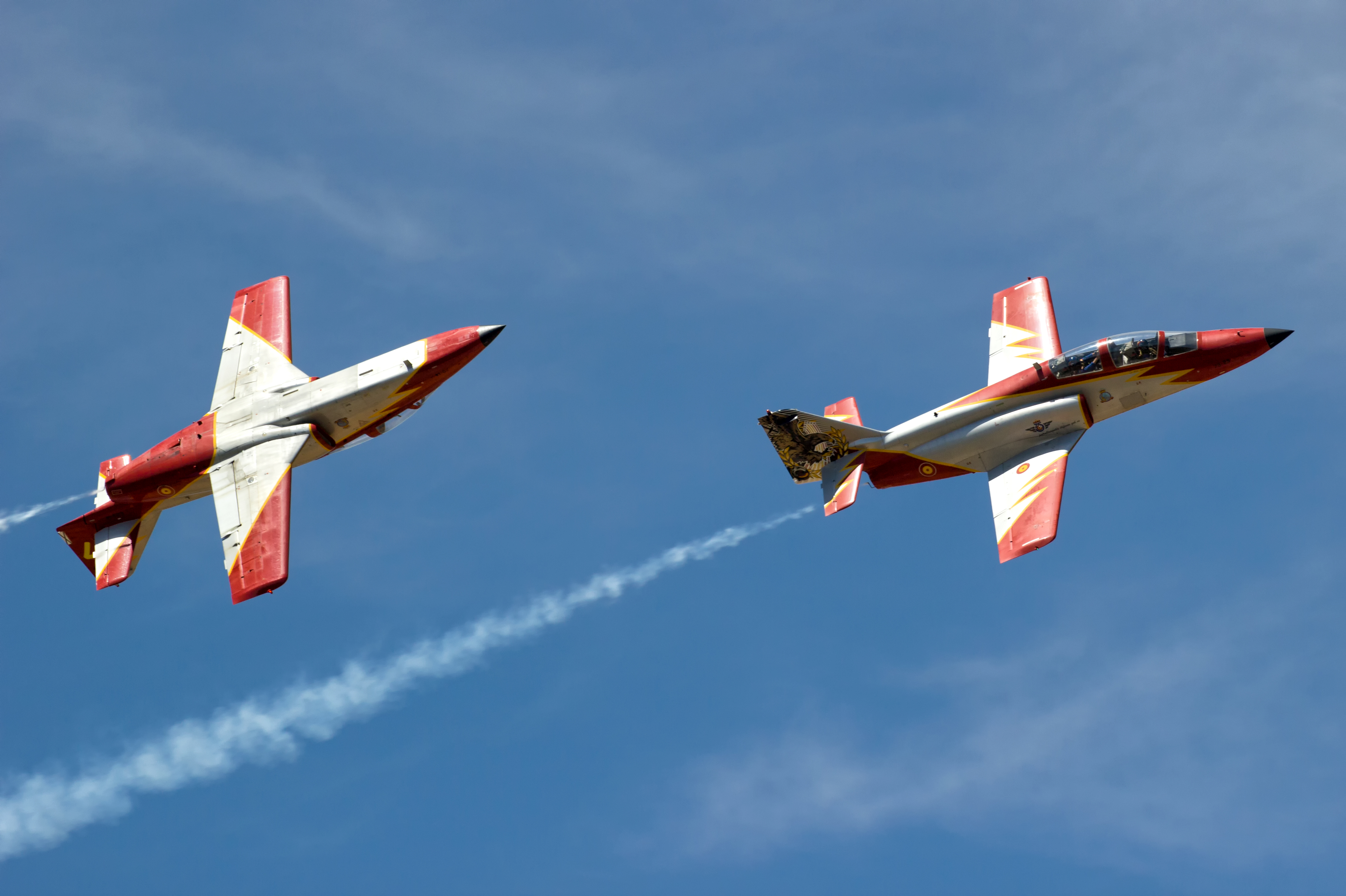 A Patrulla Águila nos actos polo 25 aniversario da Academia Básica do Aire de León.